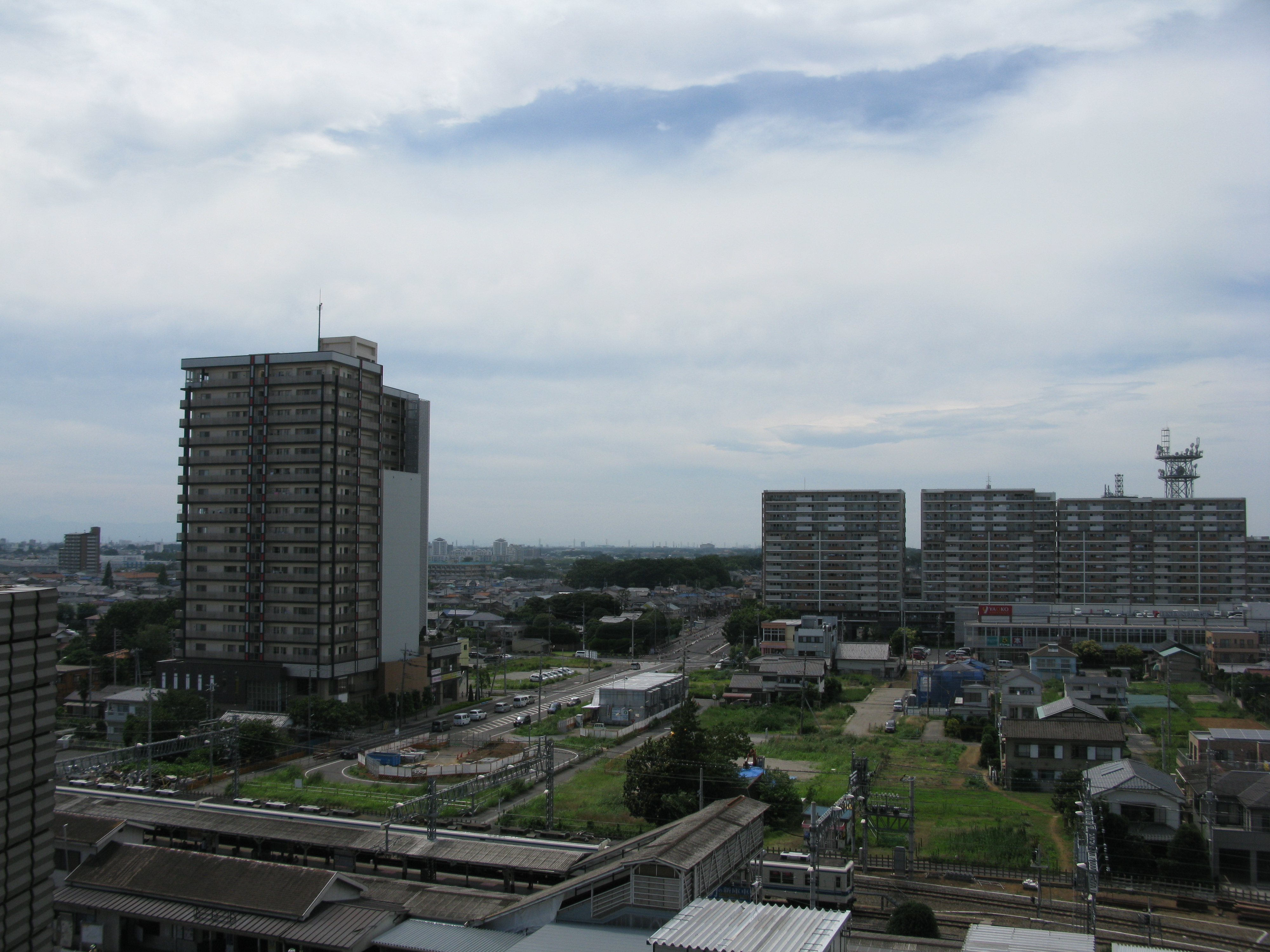 東武野田線岩槻駅北方。